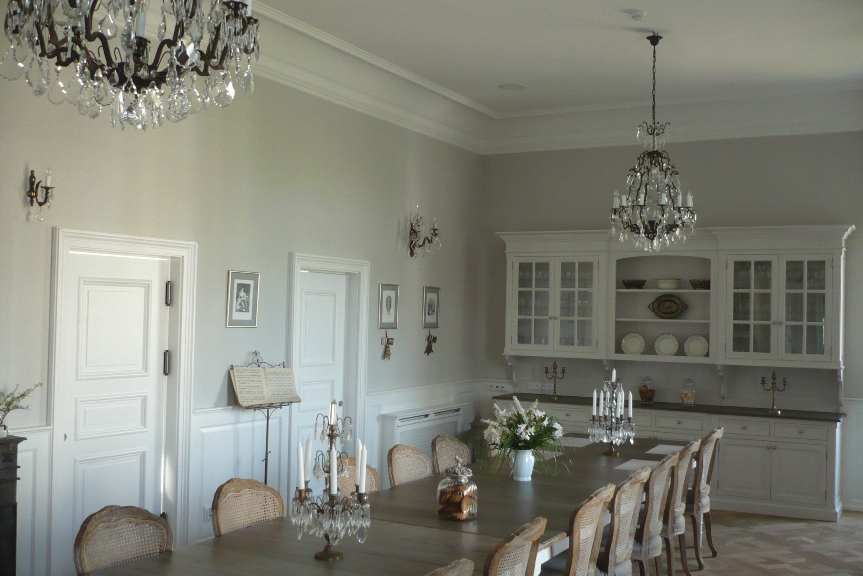 Kamieniec.Sala